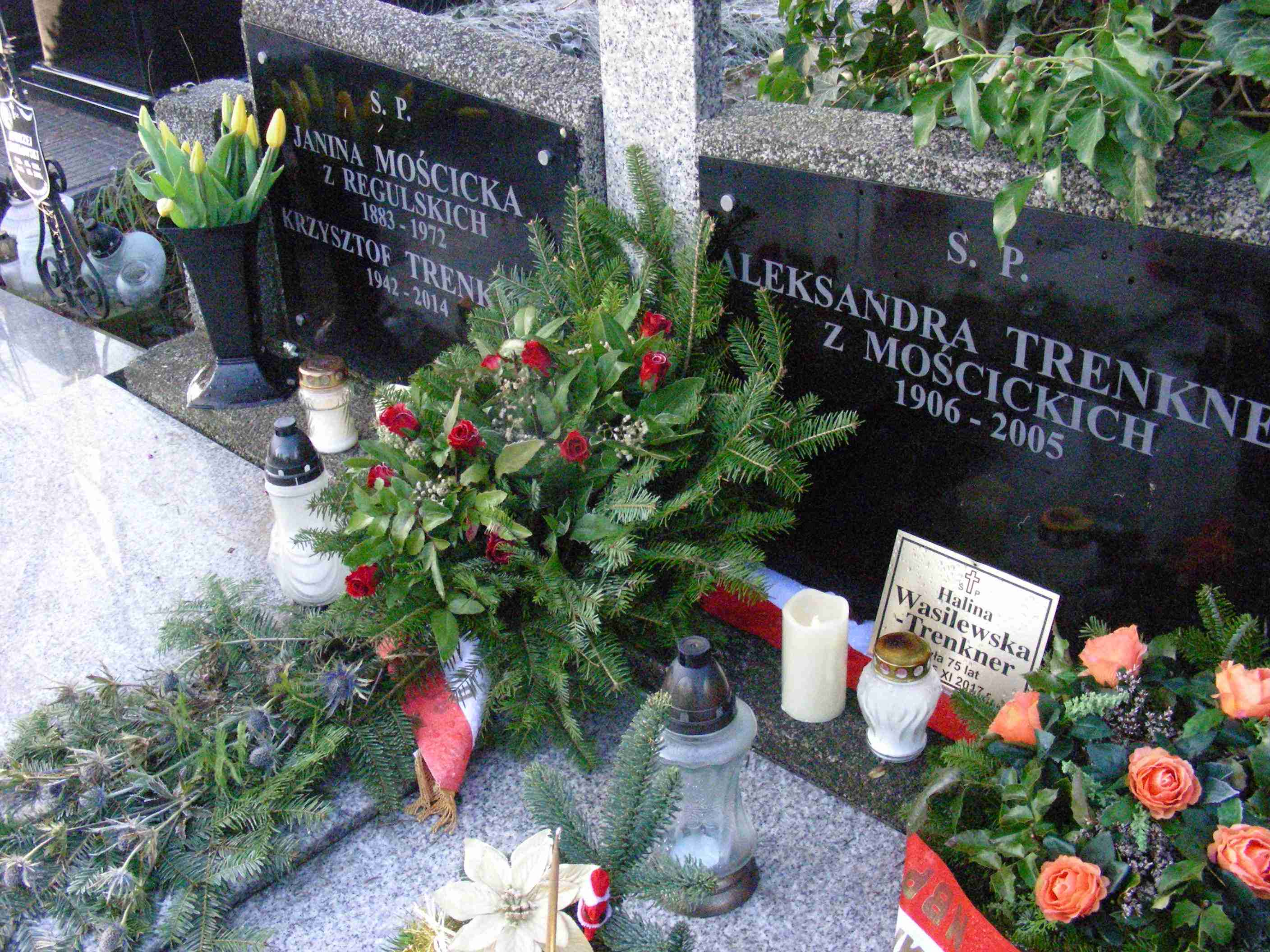 Halina Wasilewska-Trenkner grave, Cmentarz Wilanowski, Warsaw, Poland.